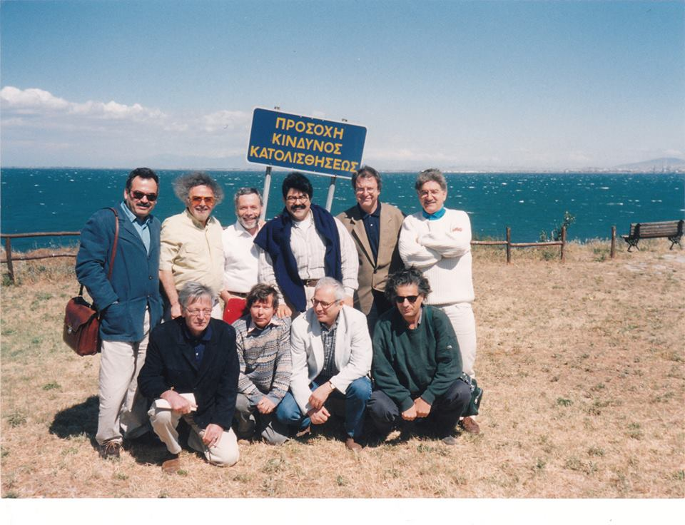 Όρθιοι από αριστερά: Μανόλης Ξεξάκης, Μανόλης Πρατικάκης, Γιώργος Μαρκόπουλος, Αντώνης Φωστιέρης, Κώστας Μαυρουδής, Ντίνος Σιώτης. Καθιστοί: Γιάννης Βαρβέρης, Βασίλης Στεριάδης, Νάσος Βαγενάς, Αναστάσης Βιστωνίτης.